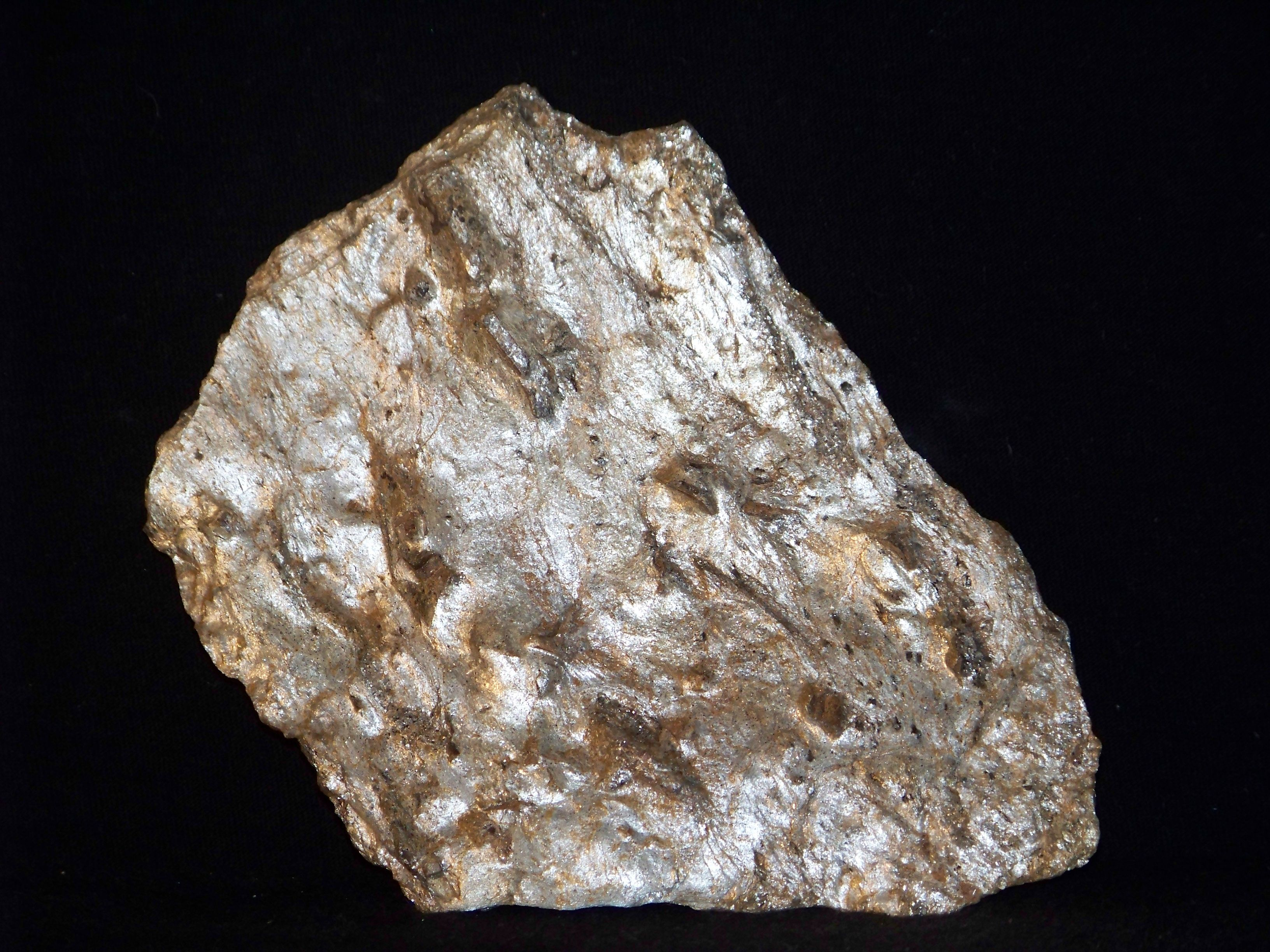 łupek serycytowy ze staurolitem i almandynem, Głuchołazy, Góry Opawskie, Śląsk Opolski, Polska